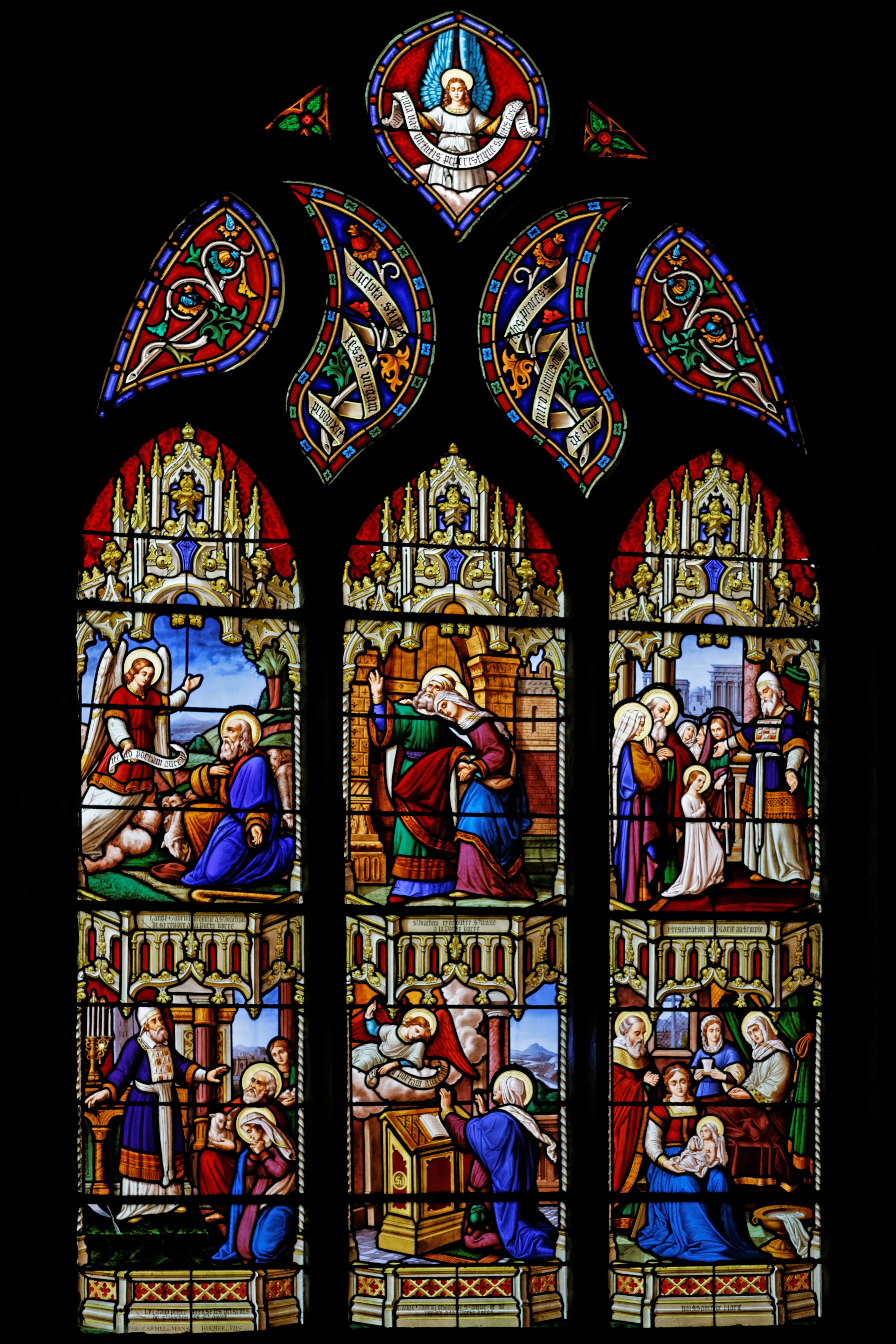 Vitrail (1891), oeuvre de Hucher fils (Fabrique du Carmel du Mans) dans la cathédrale Saint-Paul-Aurélien de Saint-Pol-de-Léon. Ce vitrail représente six scènes de la vie de saint Joachim et de sainte Anne, parents de la Vierge Marie.